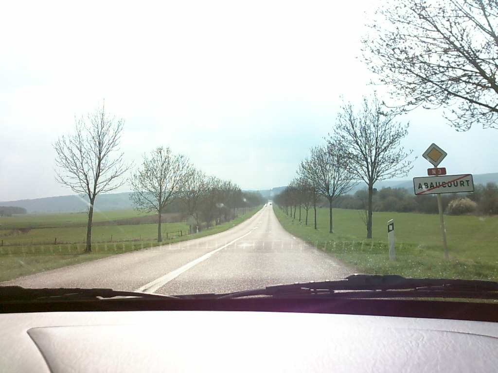 Route Nationale 3 beim Ortsausgang von Abaucourt